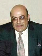 فرج فودة و جعفر النميري